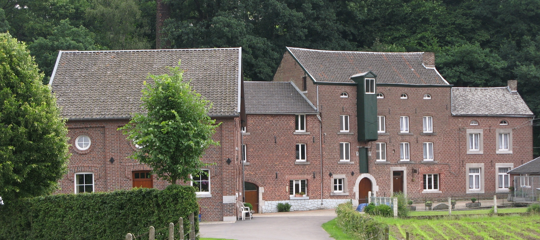 De Moulin de Kerweer am Juni 2008.